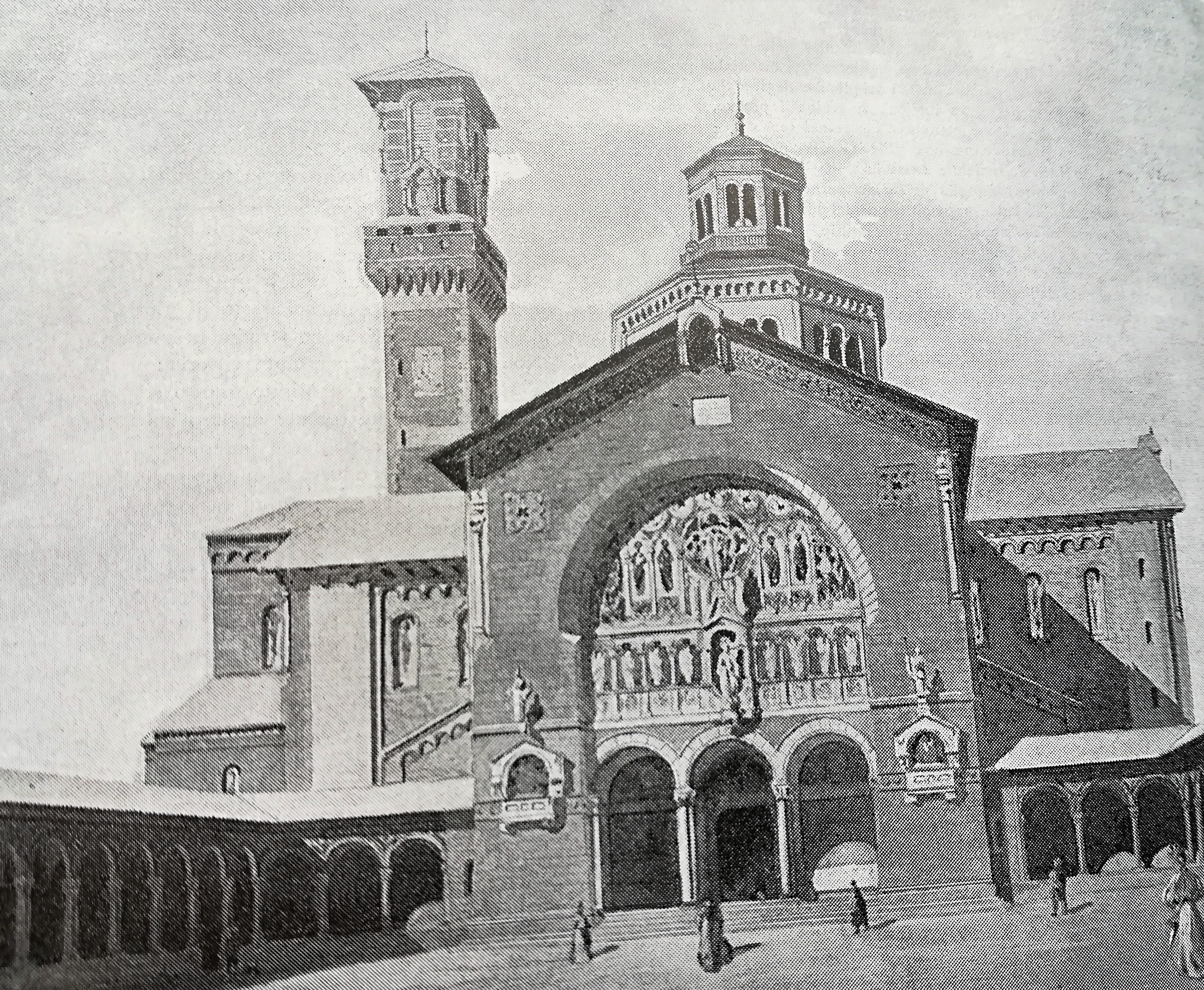 Disegno del progetto dell'architetto Giovanni Reycend.